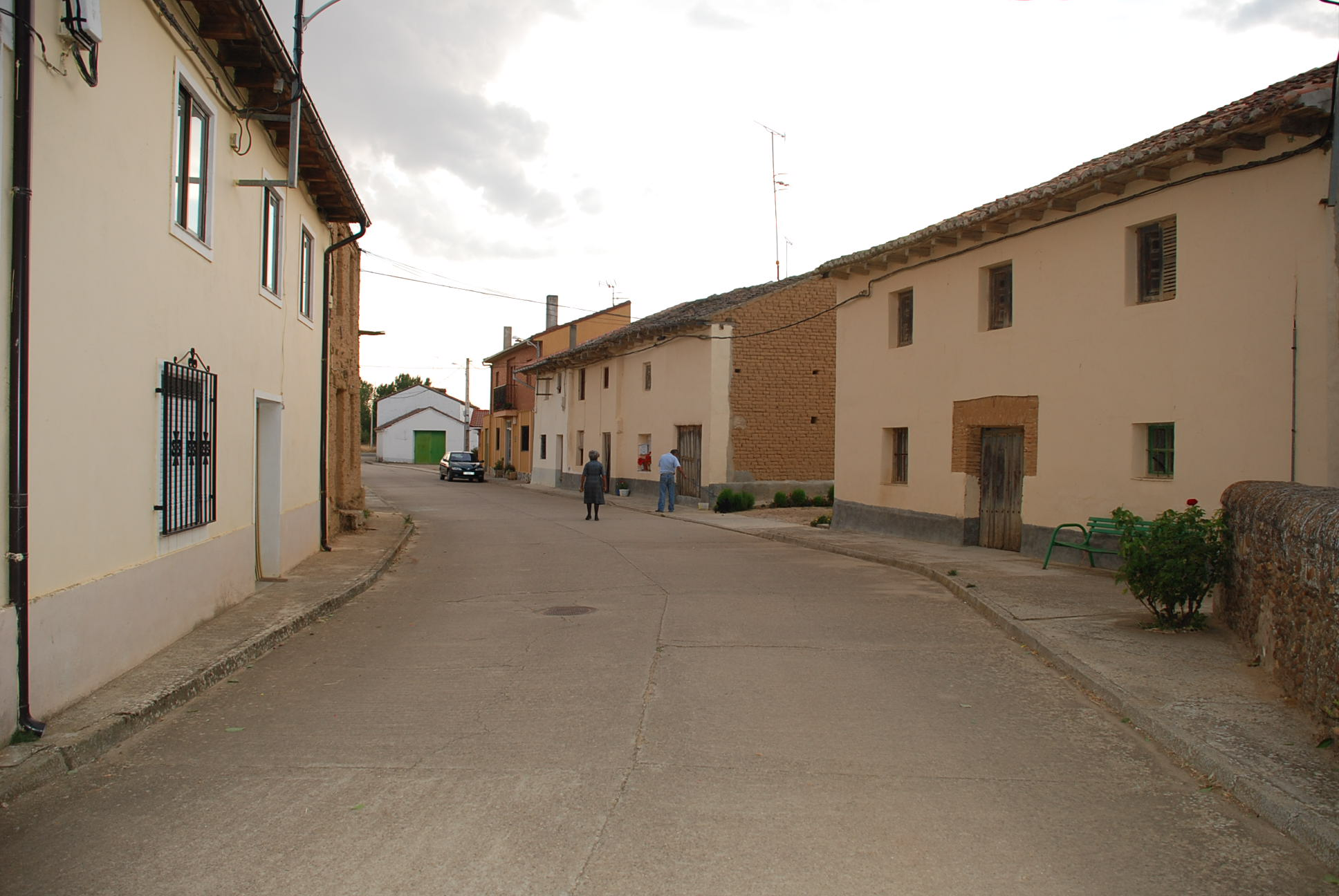 Vista de la Calle Real de Villavega de Castrillo (Palencia, Castilla-León)